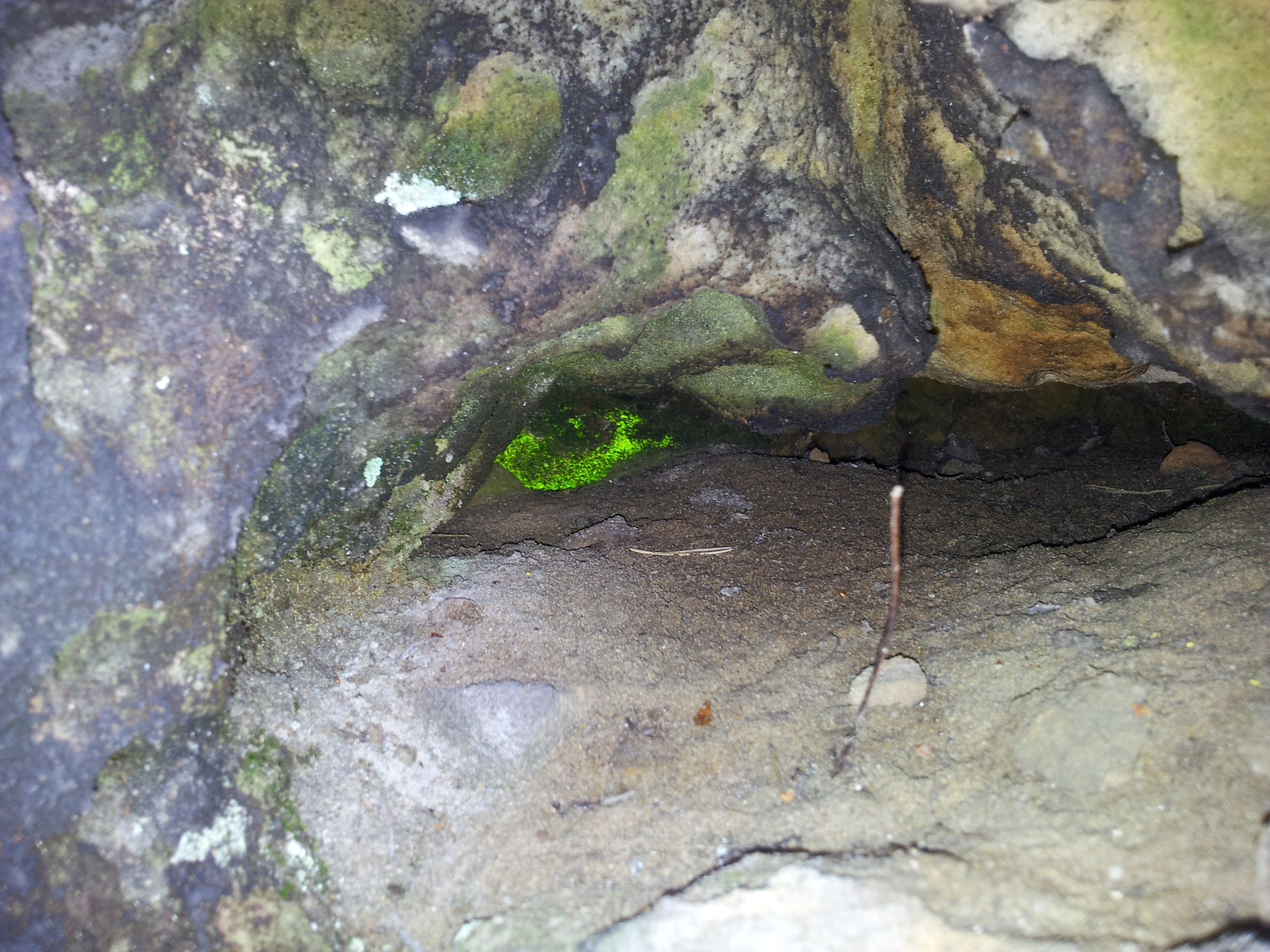 Leuchtmoos (Schistostega pennata), aufgenommen an einem Kletterfelsen in der Sächsischen Schweiz